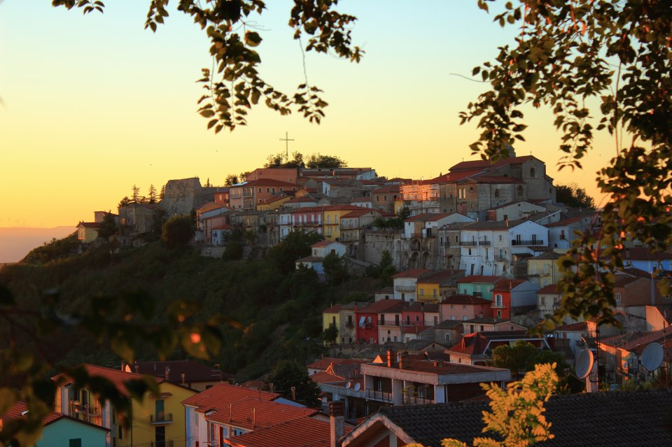 Savignano Irpino panorama